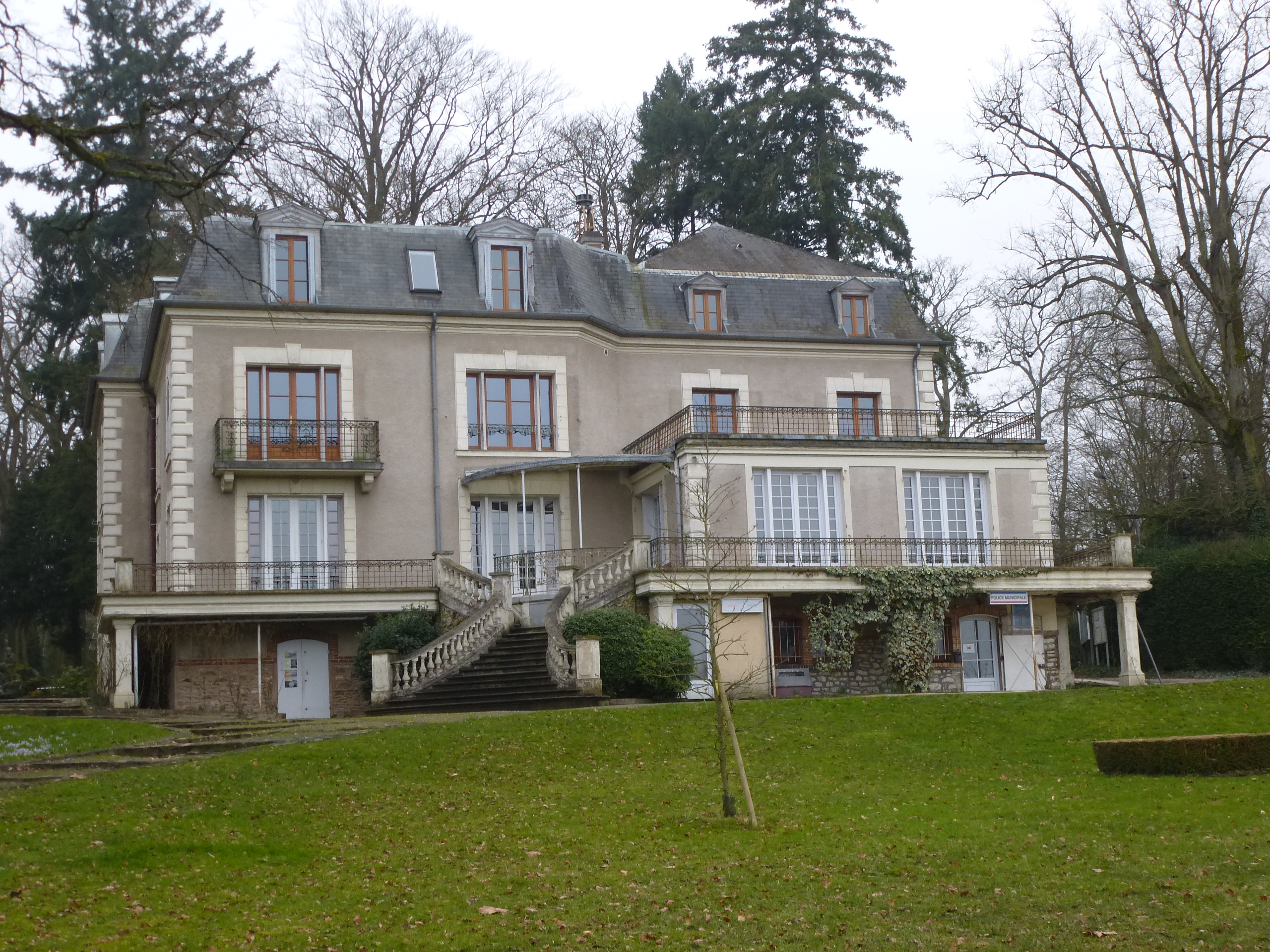 Mairie de Bois-le-Roi, façade est. (département de la Seine et Marne, région Île-de-France).